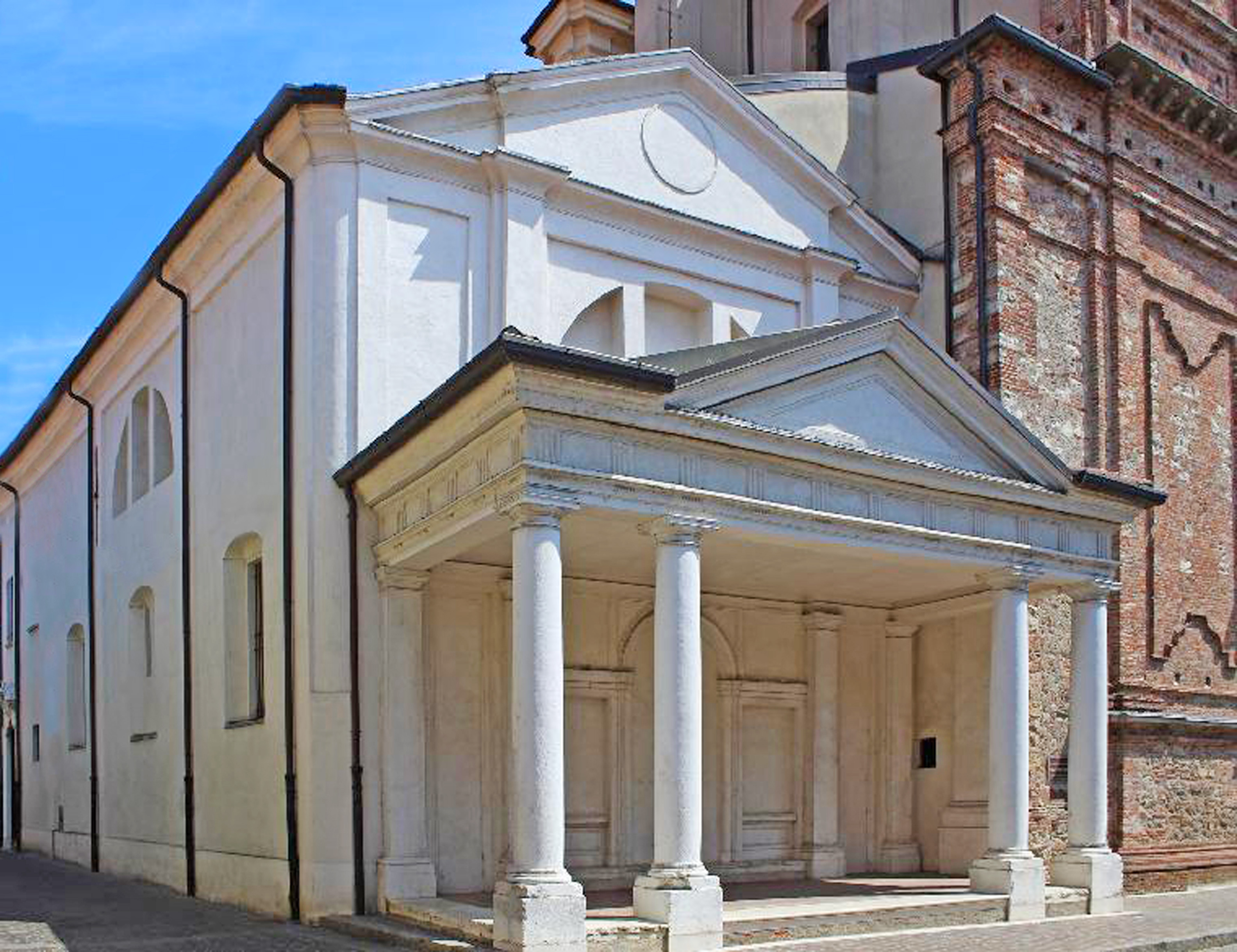 Chiesa di Sant'Antonio, Travagliato